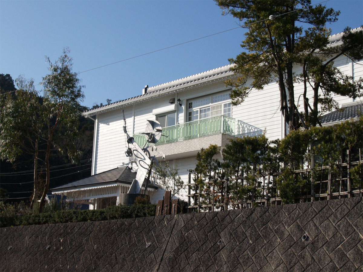 伊勢現代美術館外観